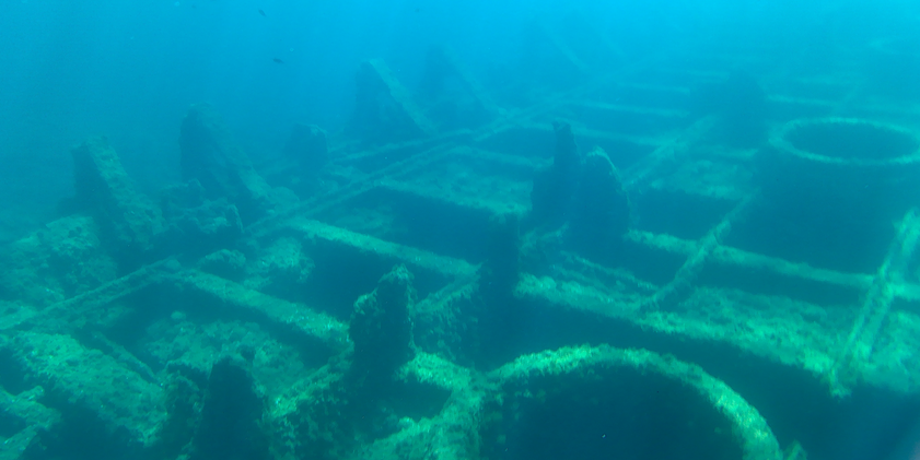 Epave du ponton bigue samsonne